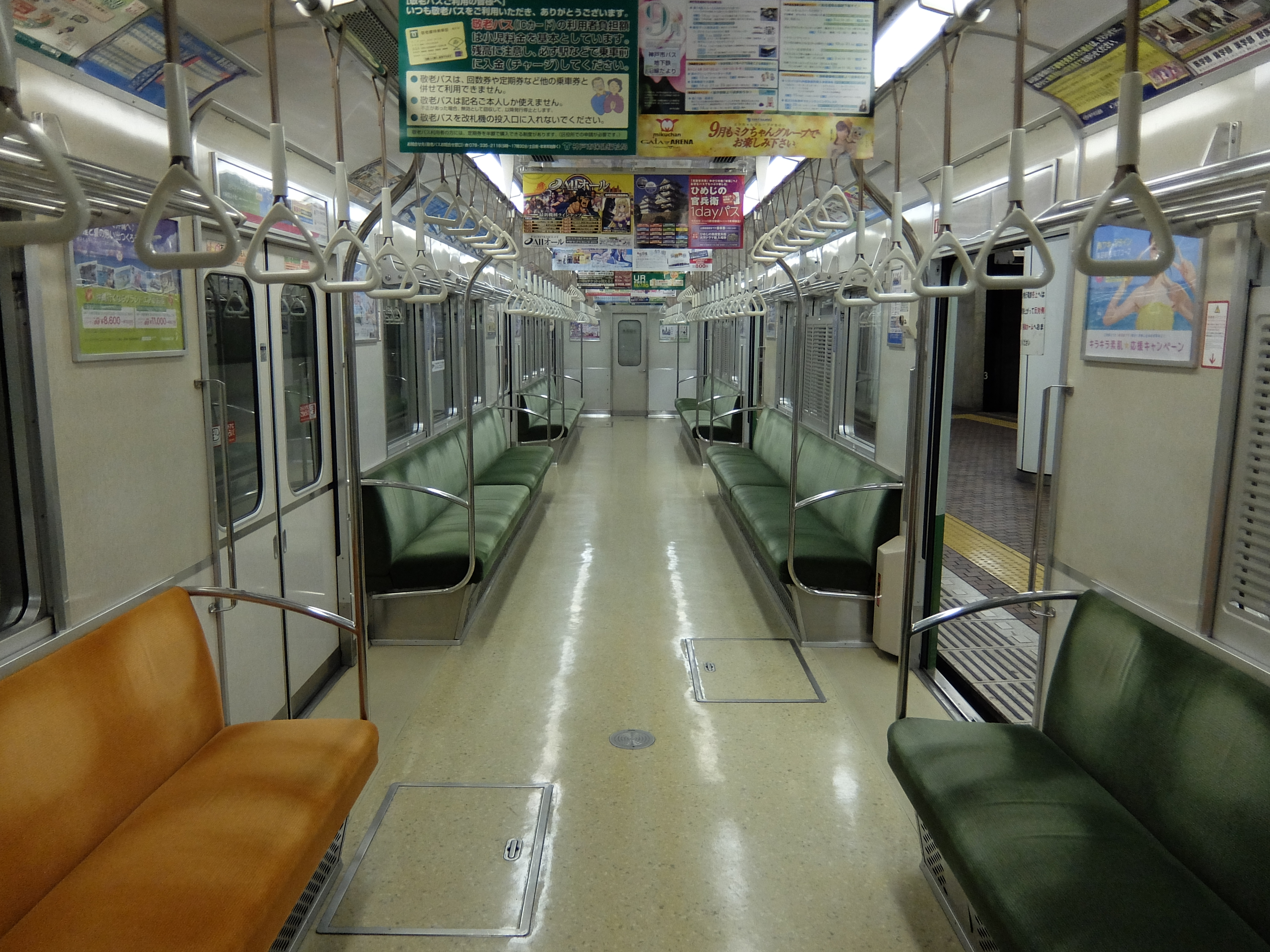 神戸市交通局1000形 車内の様子